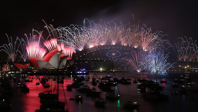 Fuegos Artificiales en la Bahia De Sydney por la entrada del 2014 a Australia